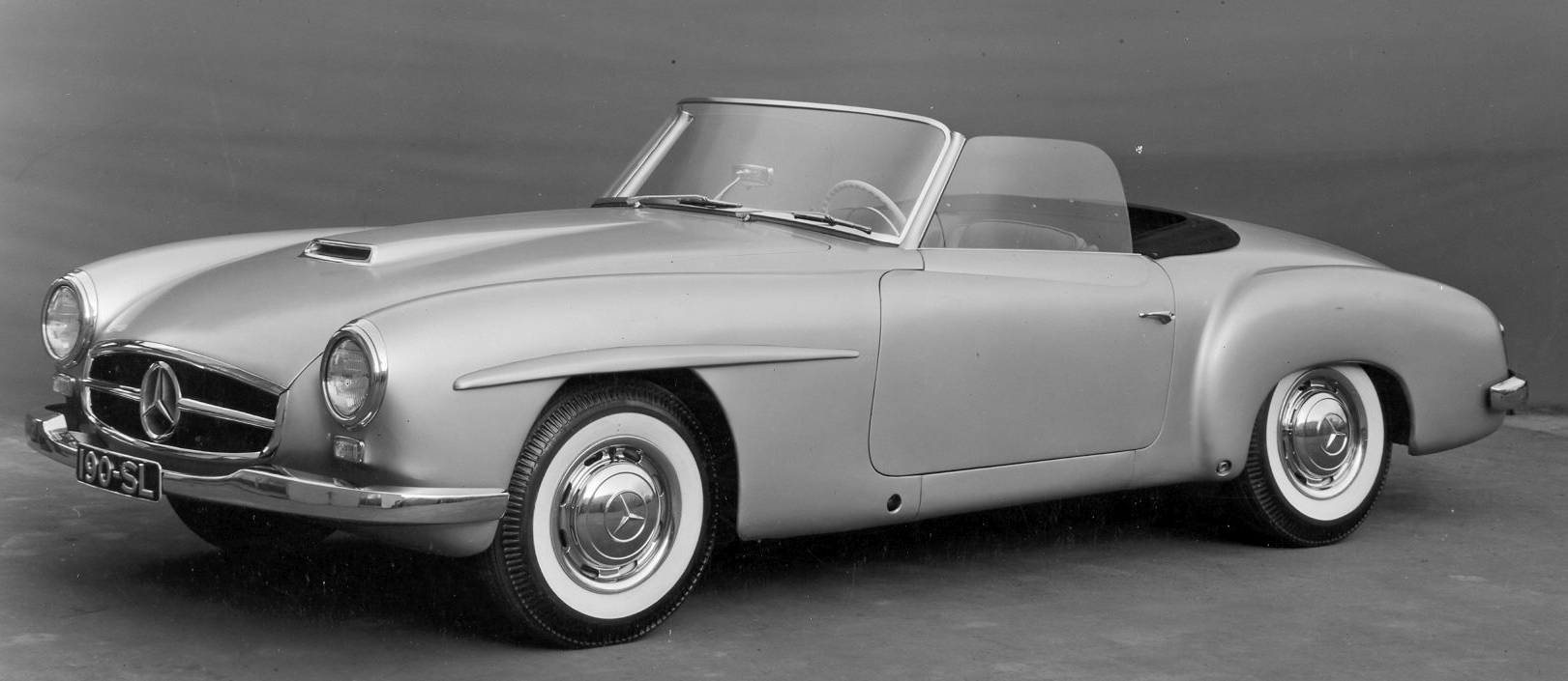 190 SL Modell New York 1954